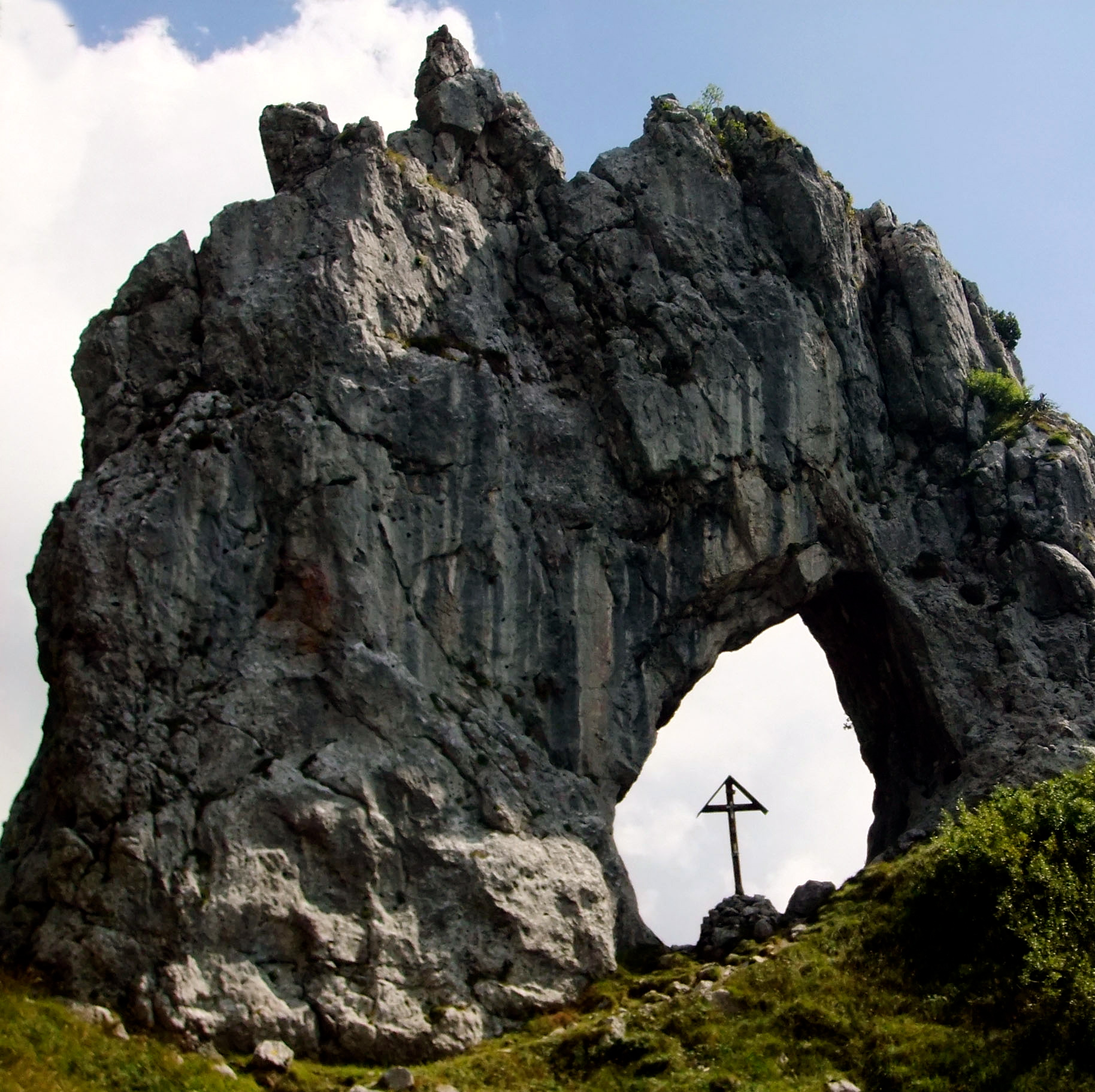 Porta di Prada This is a photo of a monument which is part of cultural heritage of Italy.